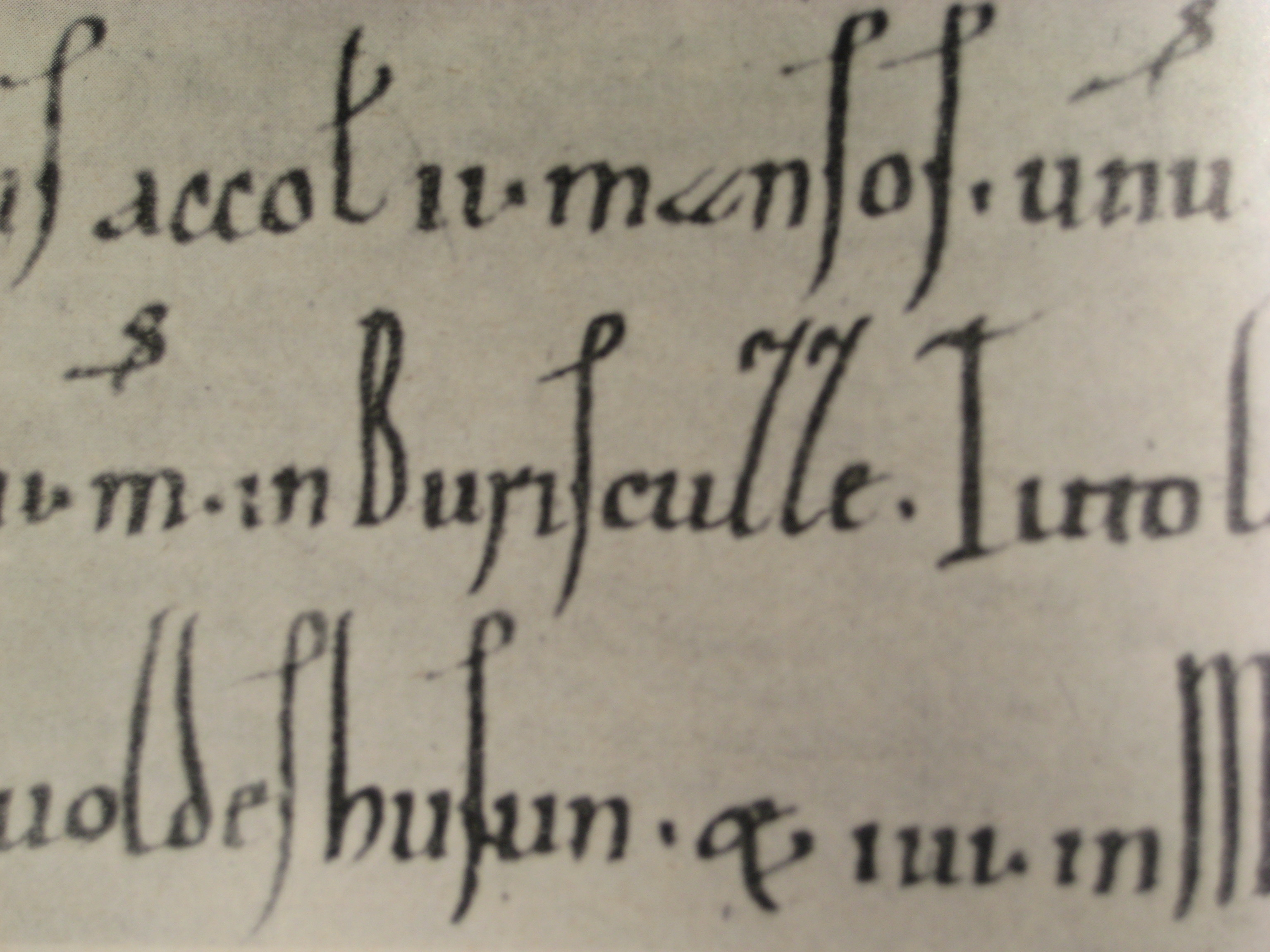 Erste Urkundliche Erwähnung von Obervorschütz von 800 n. Chr.